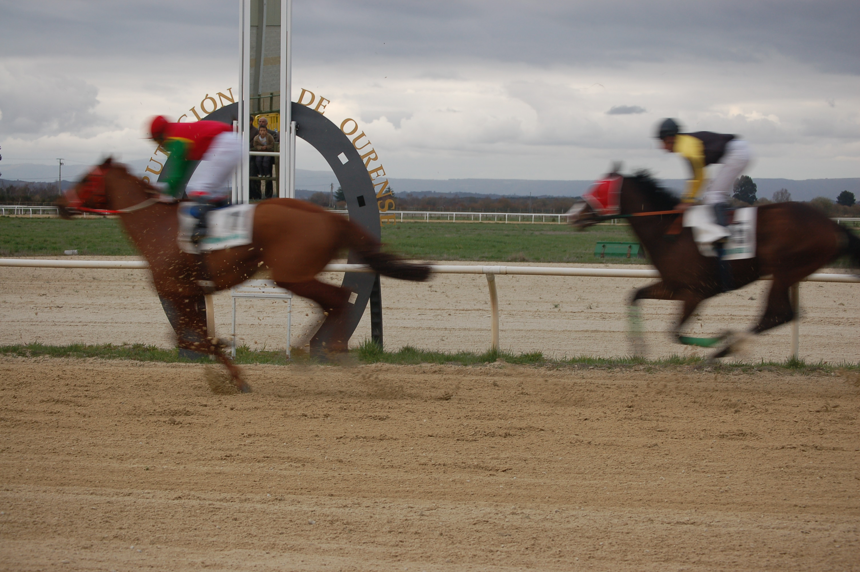 Chegada de Moonlight e Parade Ground no hipódromo de Antela